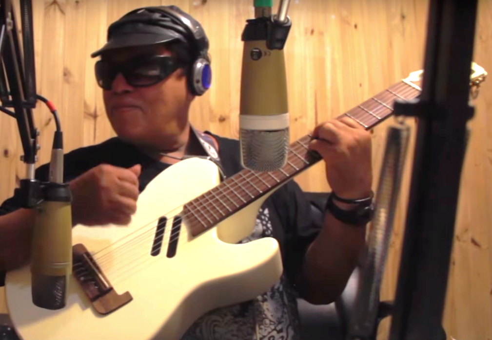 O cantor pernambucano Di Melo participou do Vaidapé na Rua nos estúdios da Rádio Cidadã FM no Butantã no dia 21/3/2016. O músico se apresentou ao vivo e lançou seu álbum "O Imorrível".